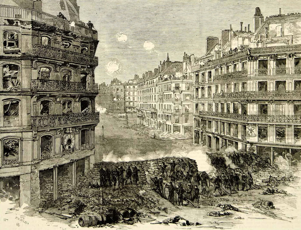 Les combats dans la rue Rivoli pendant la Commune de Paris